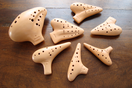 Ocarine di Minsoo Kim